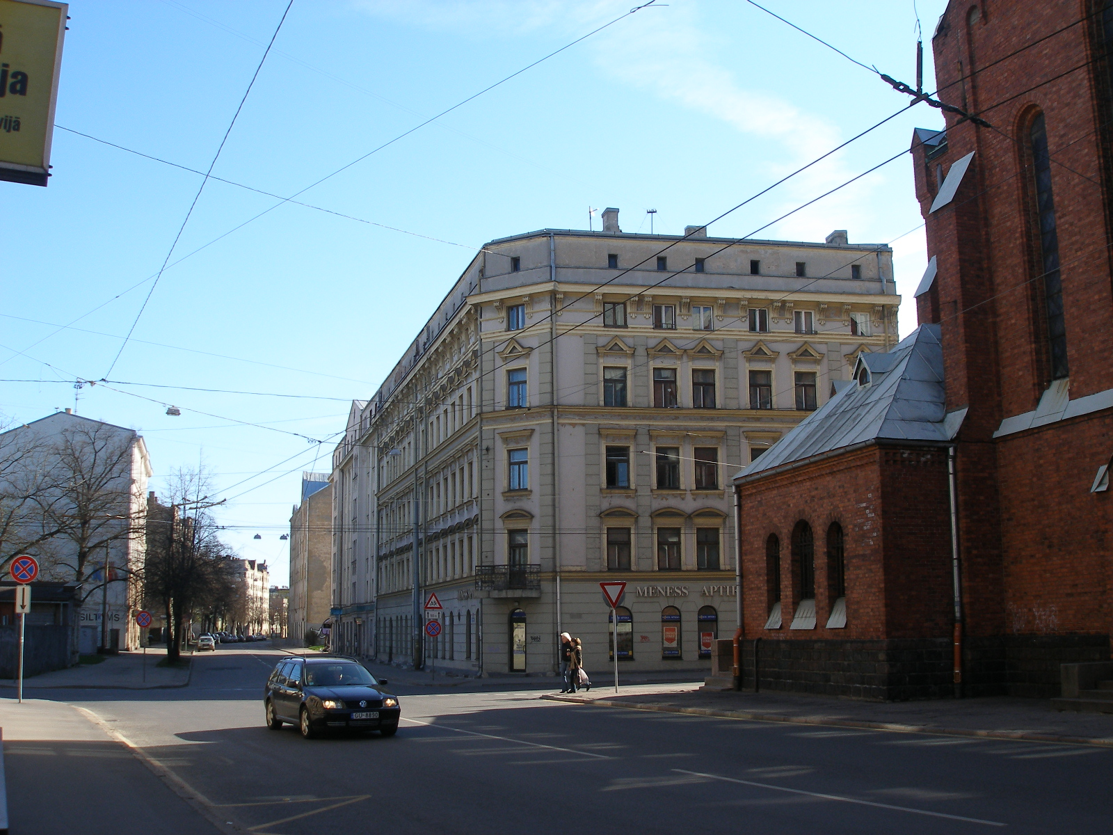 Cēsu iela Rīgā (pie Jaunās Ģertrūdes baznīcas). Fotografēts 2010. gada 3. maijā.